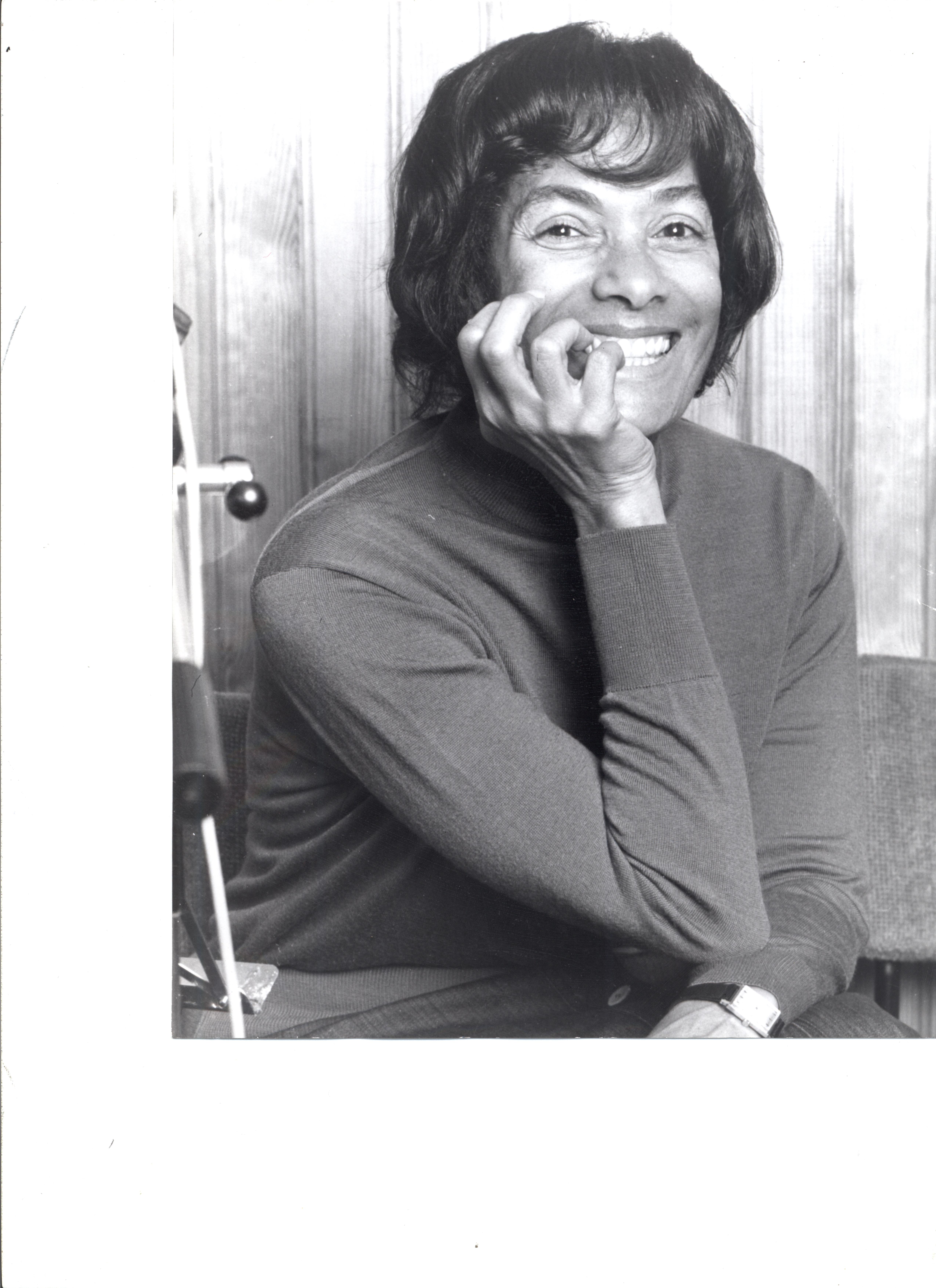 Maria d'Apparecida Chanteuse brésilienne